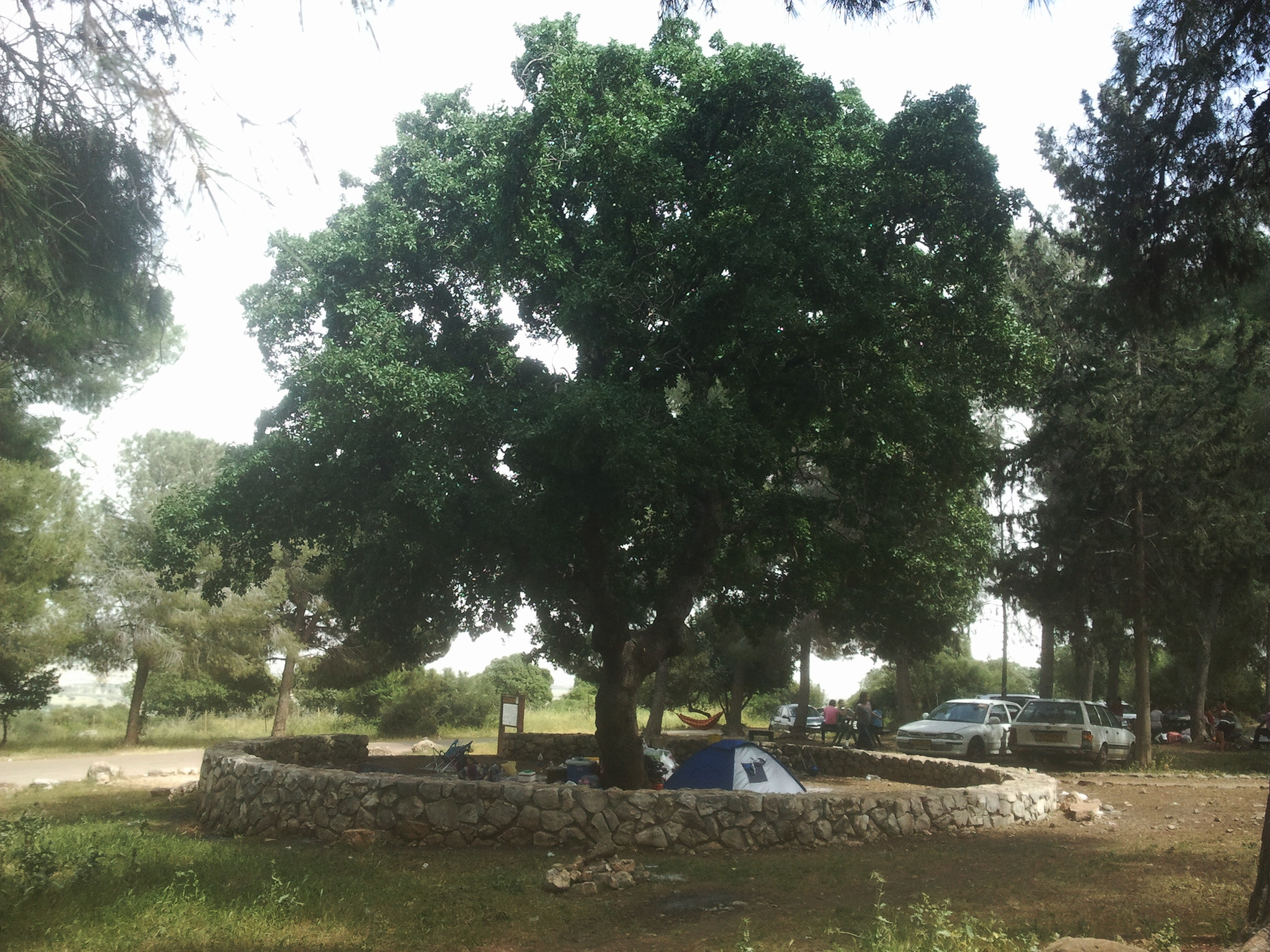 אלון תבור עתיק הנמצא ליד תל גובל, האזור סביב האלון משמש כאתר פיקניקים